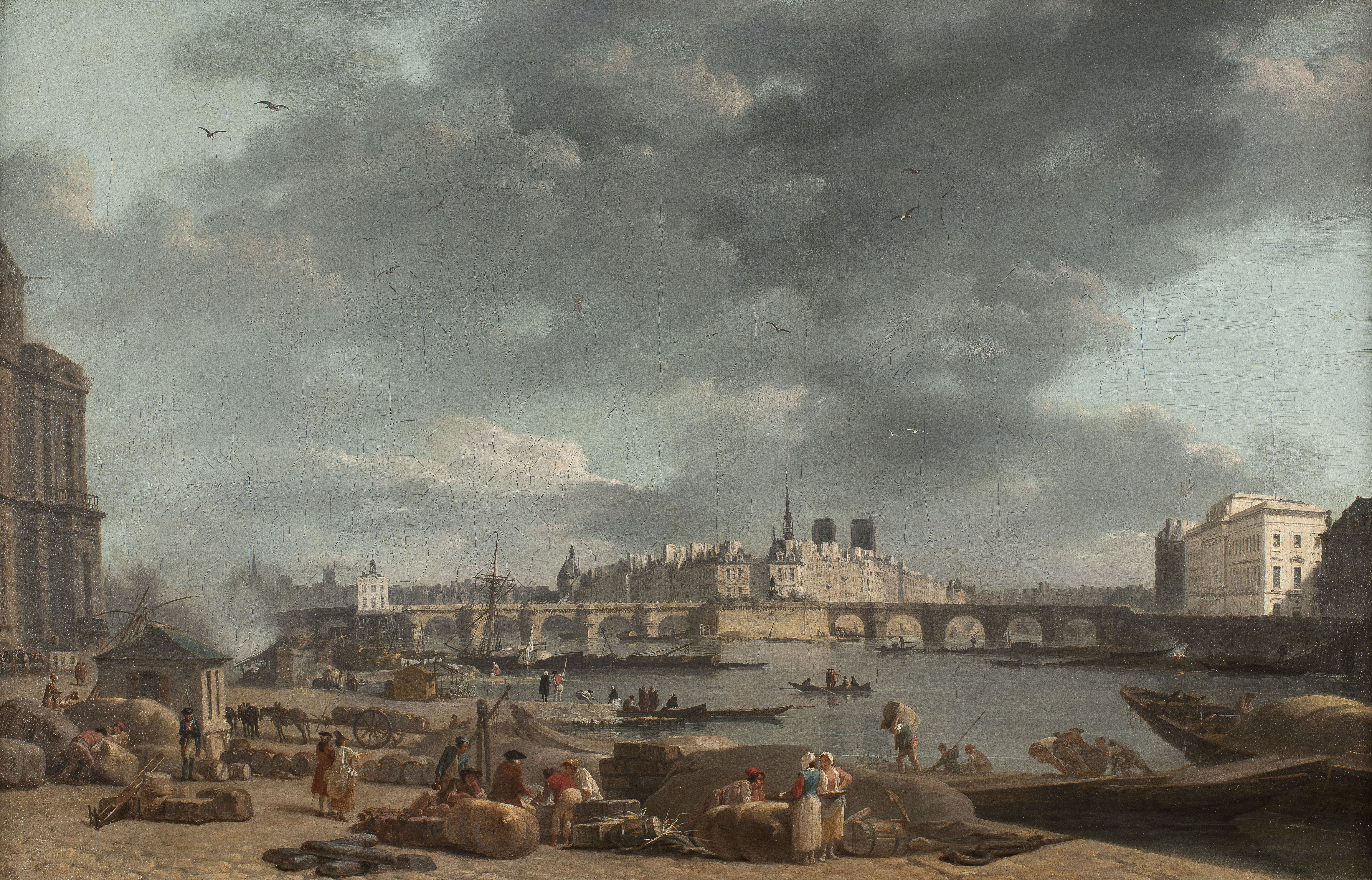 Sur ce tableau on aperçoit la pompe de la Samaritaine accrochée au Pont-Neuf qui commencera à être démolie dès 1791. Le port Saint-Nicolas correspond grosso modo à notre port du Louvre actuel.